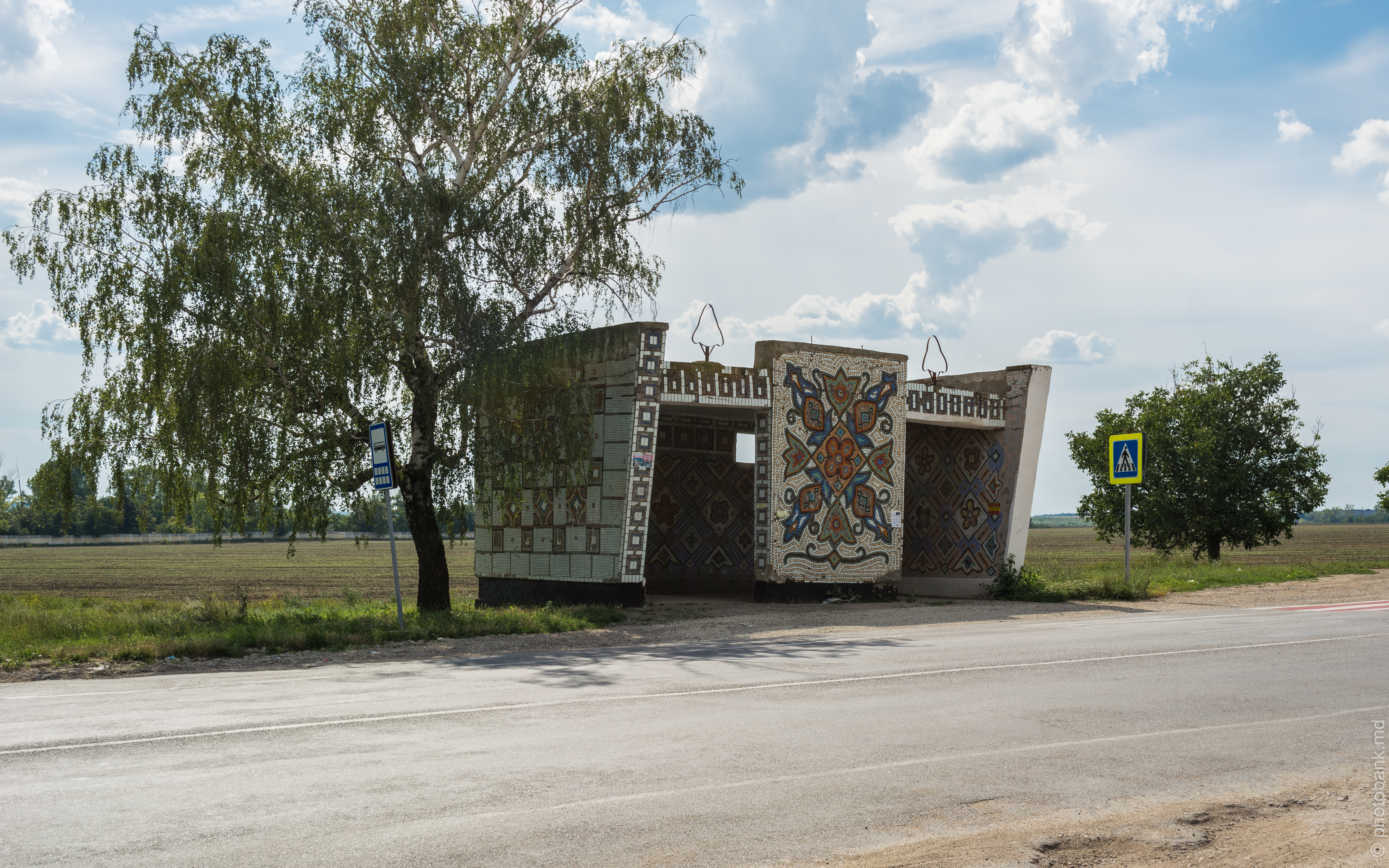 Остановка в Корлатенах / Oprire din Corlateni / Bus stop in Corlateni